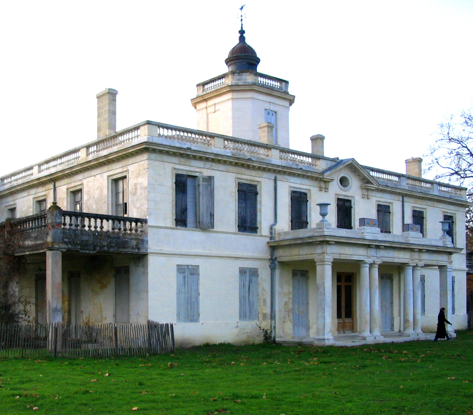 Château de Certes - Audenge - Gironde - France Auteur/author: P.Charpiat 2006